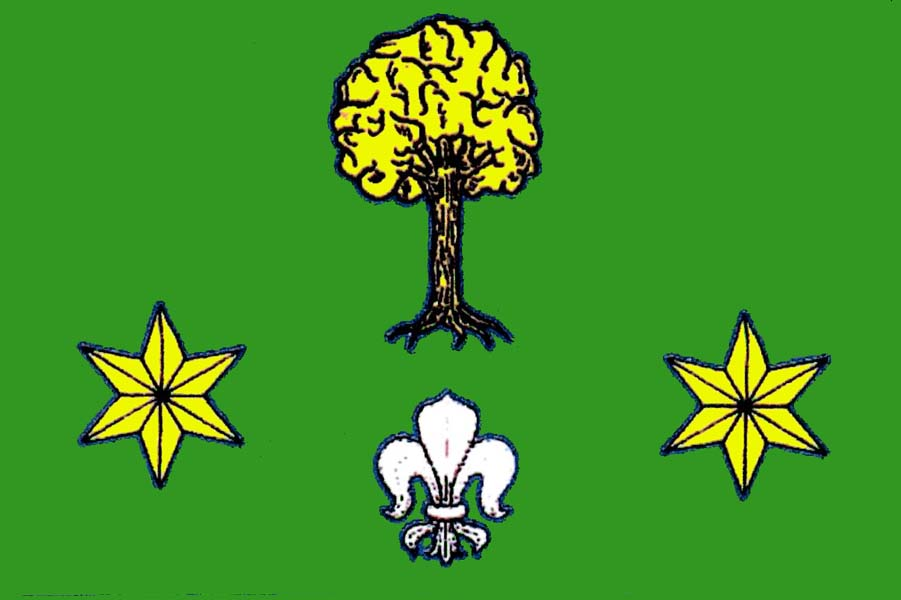 Vlajka obce Katov